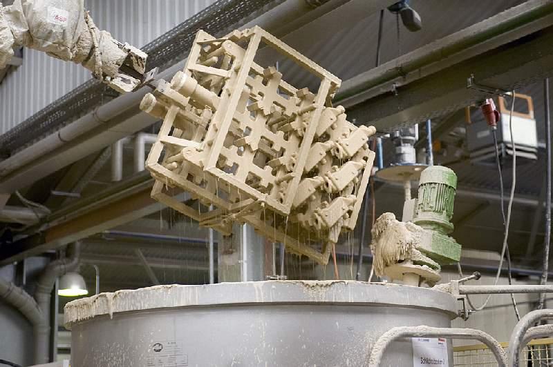 Prozessschritt des Schlichtens